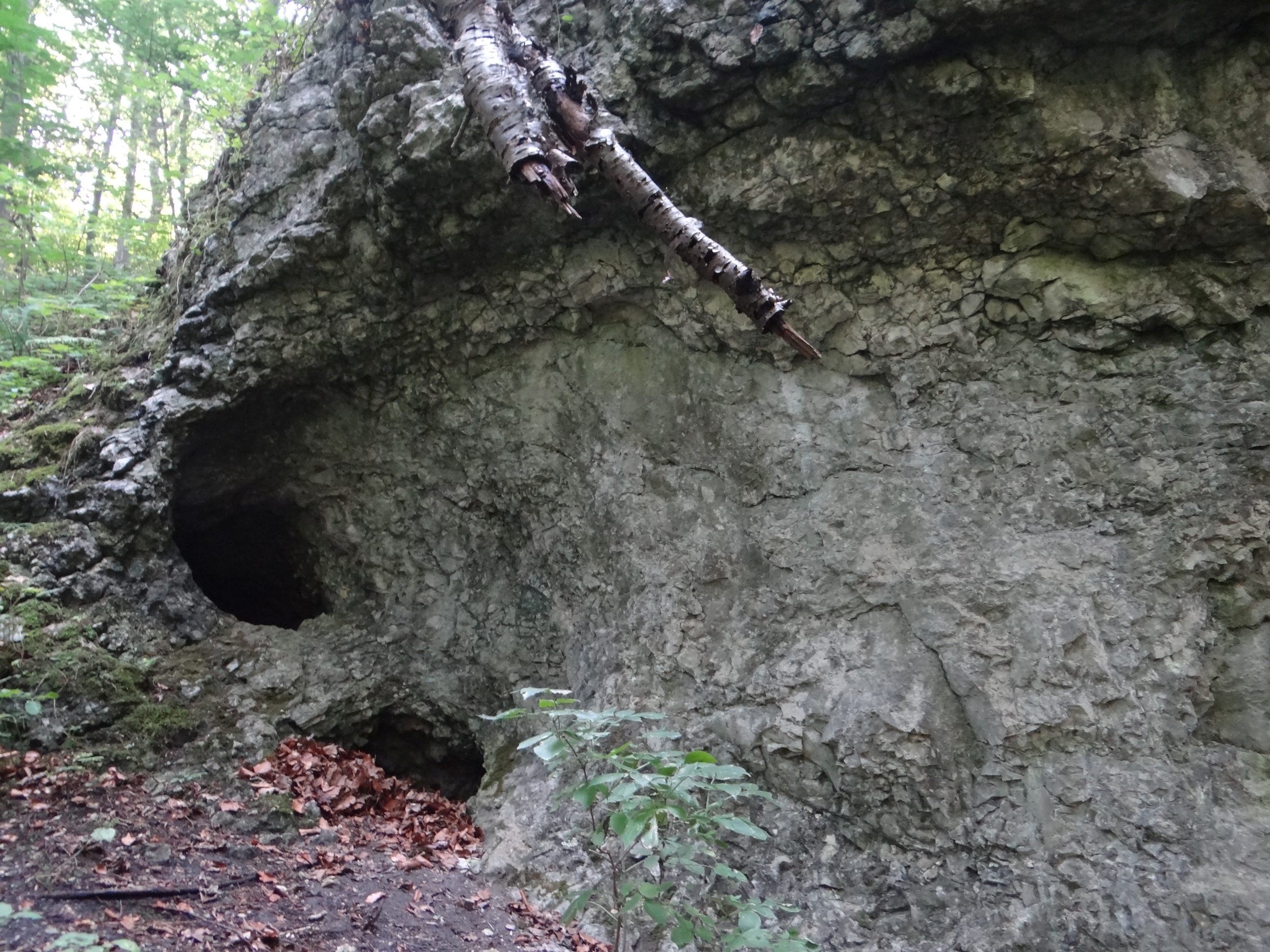 Okap z Rurą w Wielkiej Skale w Wąwozie Podskalańskim w Tomaszowicach